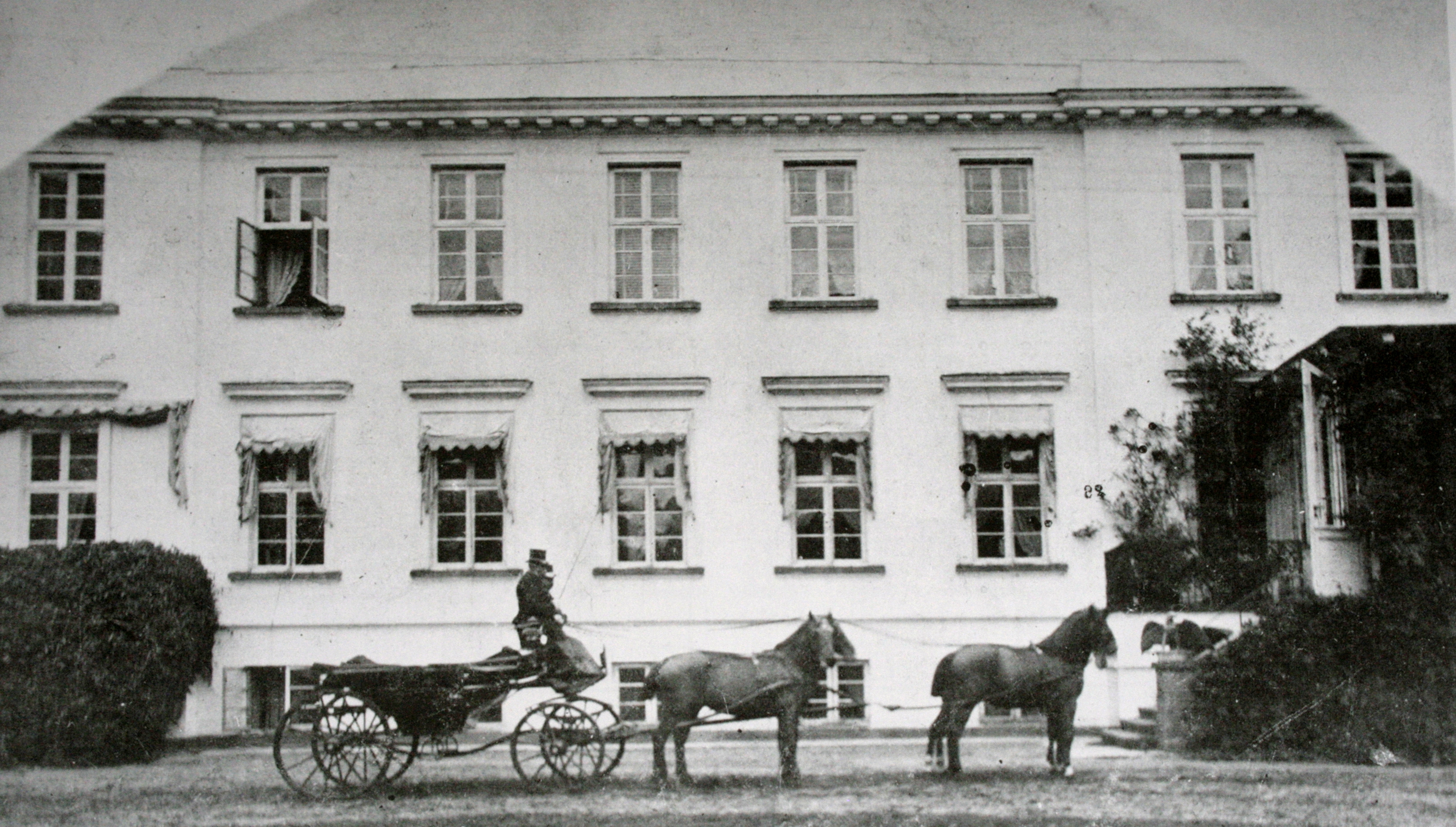 Herrenhaus Nustrow, Mecklenburg-Vorpommern, Deutschland, Fotografie der Südseite vom Ende des 19. Jahrhunderts